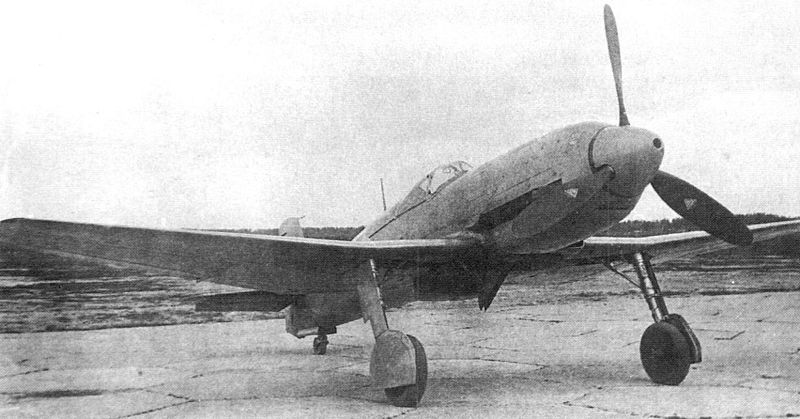 Истребитель He 100 в НИИ ВВС, 1940